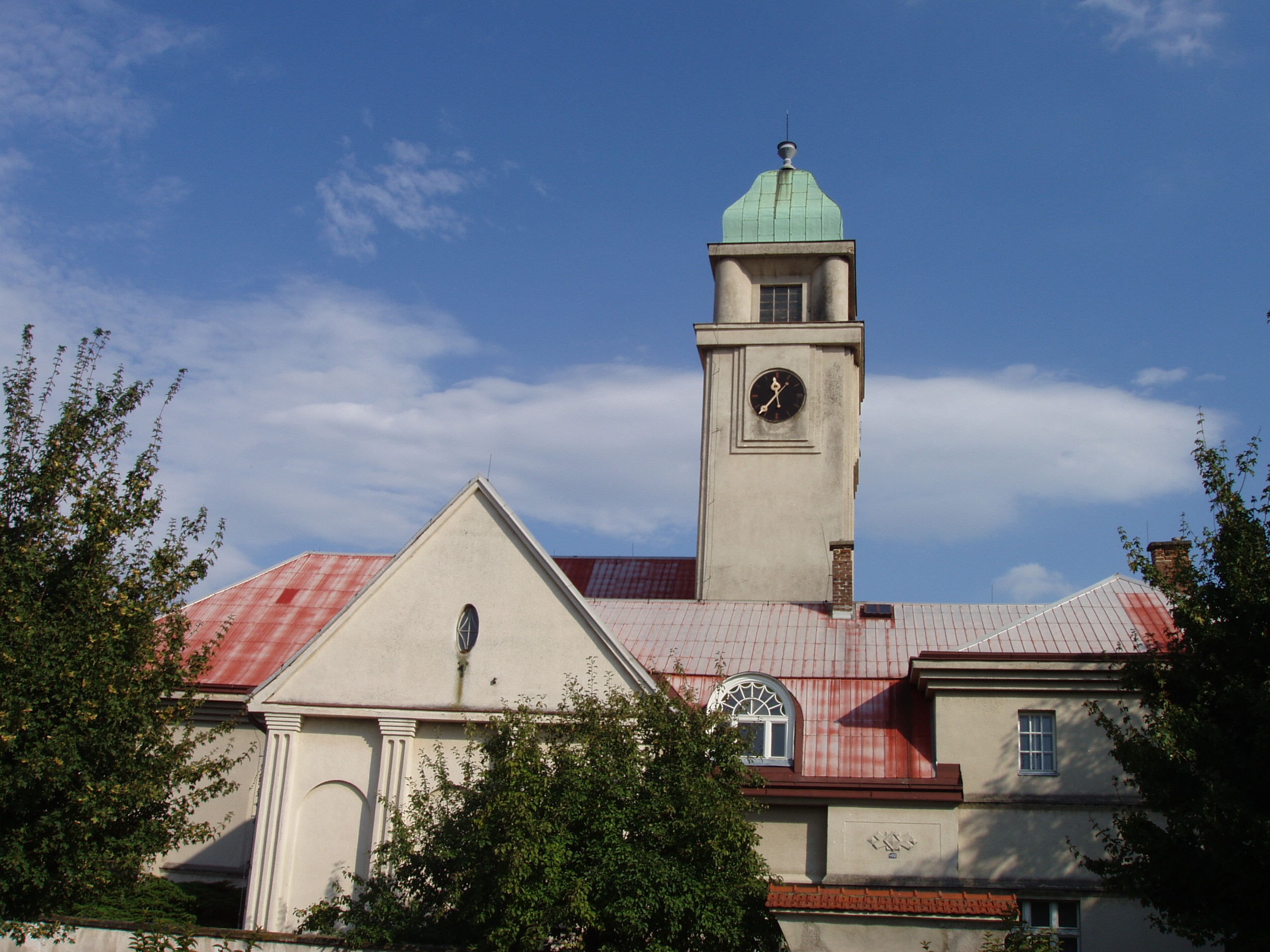 Oldřich Liska: Kostel českobratrský (Pečky), Husovo nám. 480, Pečky